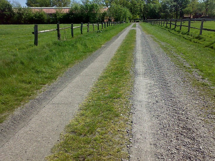 Wirtschaftsweg mit grünem Mittelstreifen